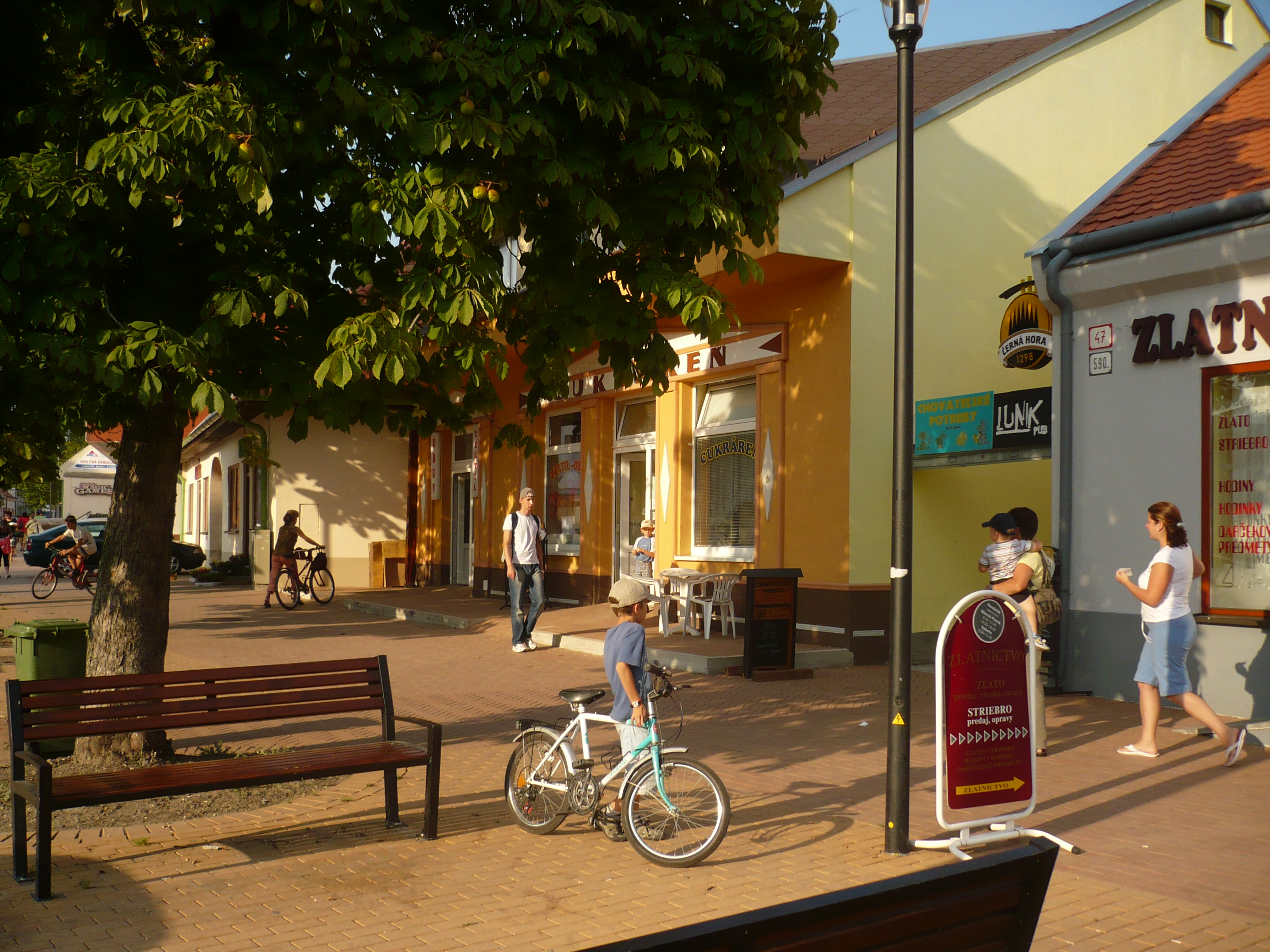 Stampfen hauptstrasse